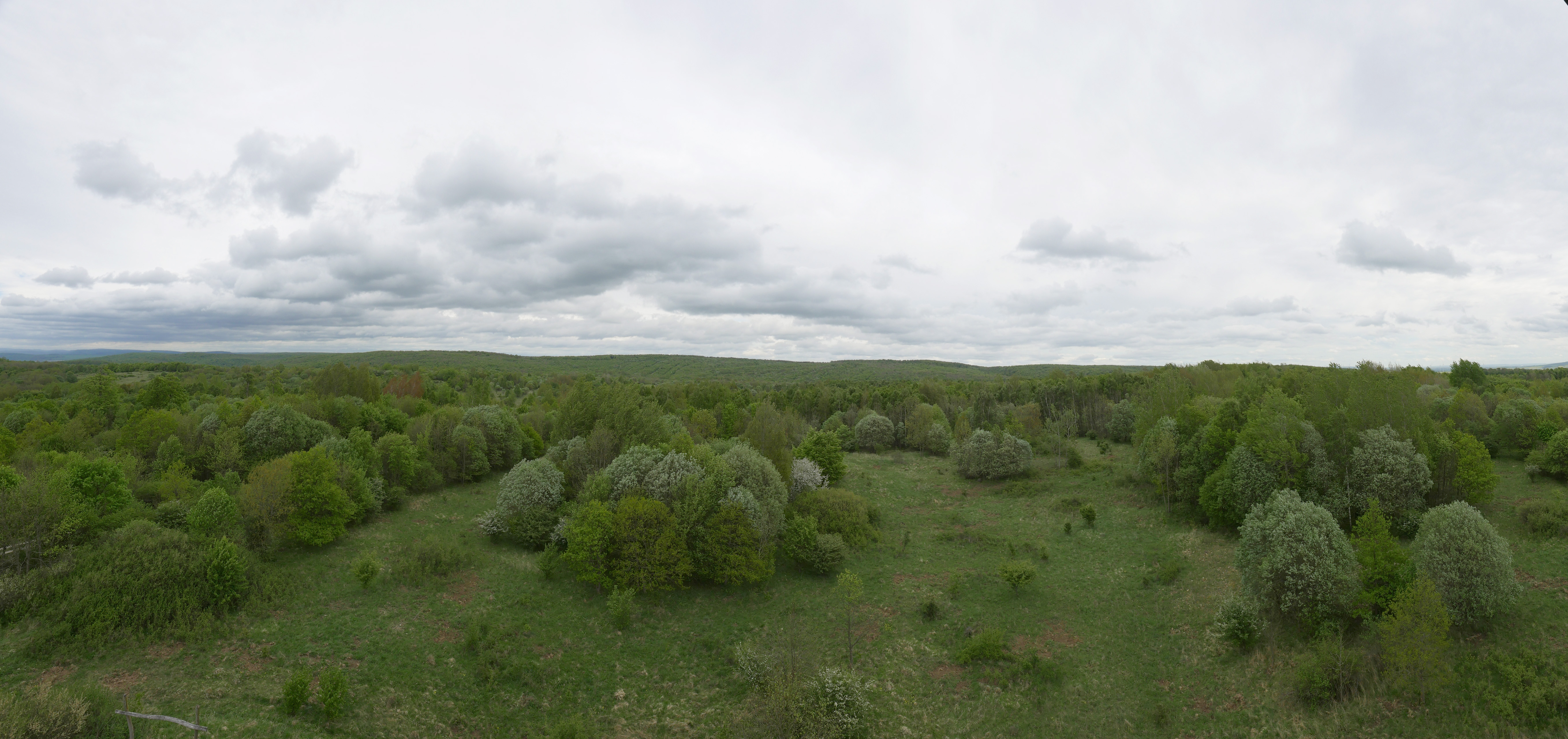 Nationalpark Hainich, Thüringen, Deutschland, Blick vom Aussichtsturm "Hainichblick" nach Norden in den Hainich